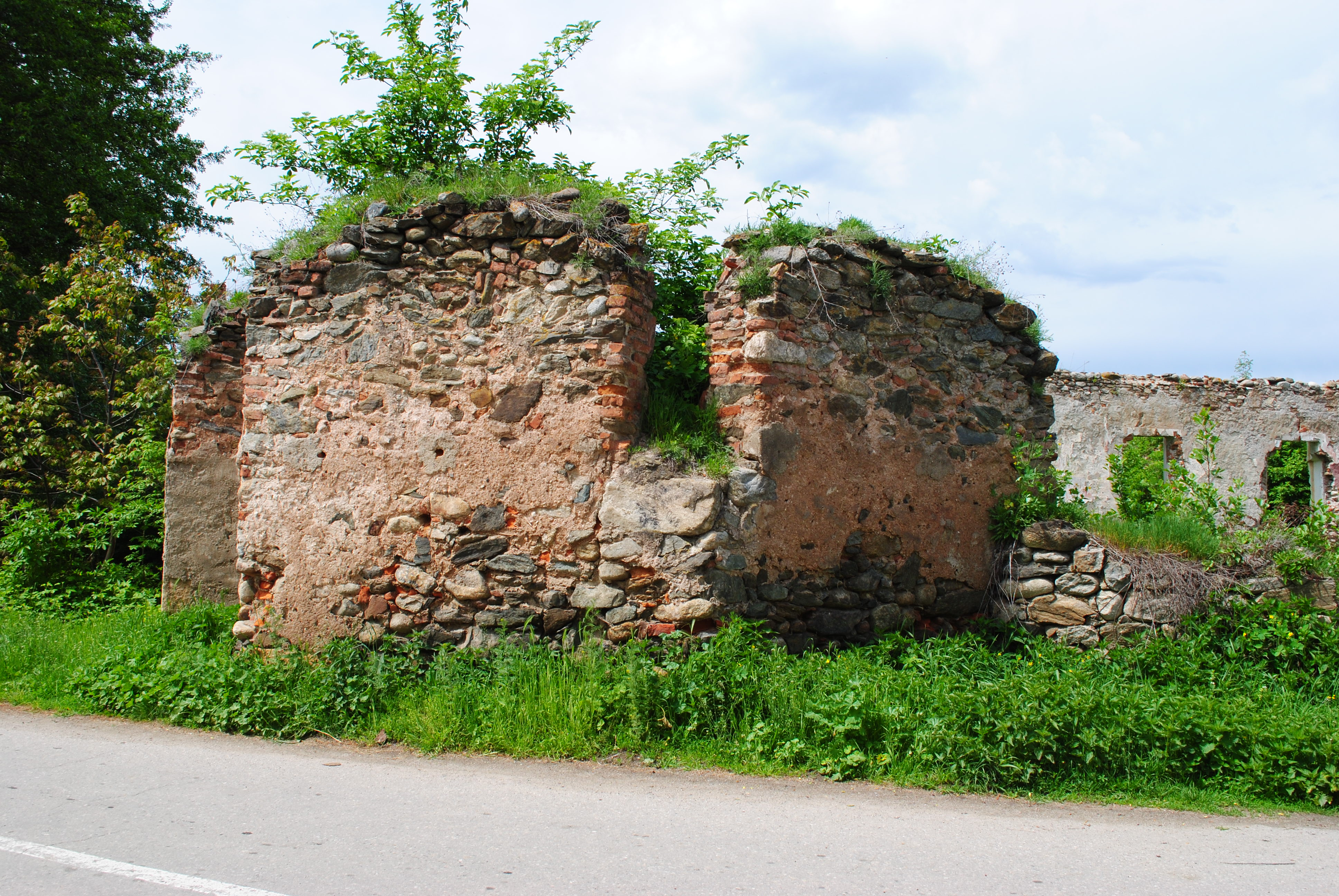 Curtea nobiliară a Cândeștilor, sec. XV - XVI, transf. sec. XVII-XIX